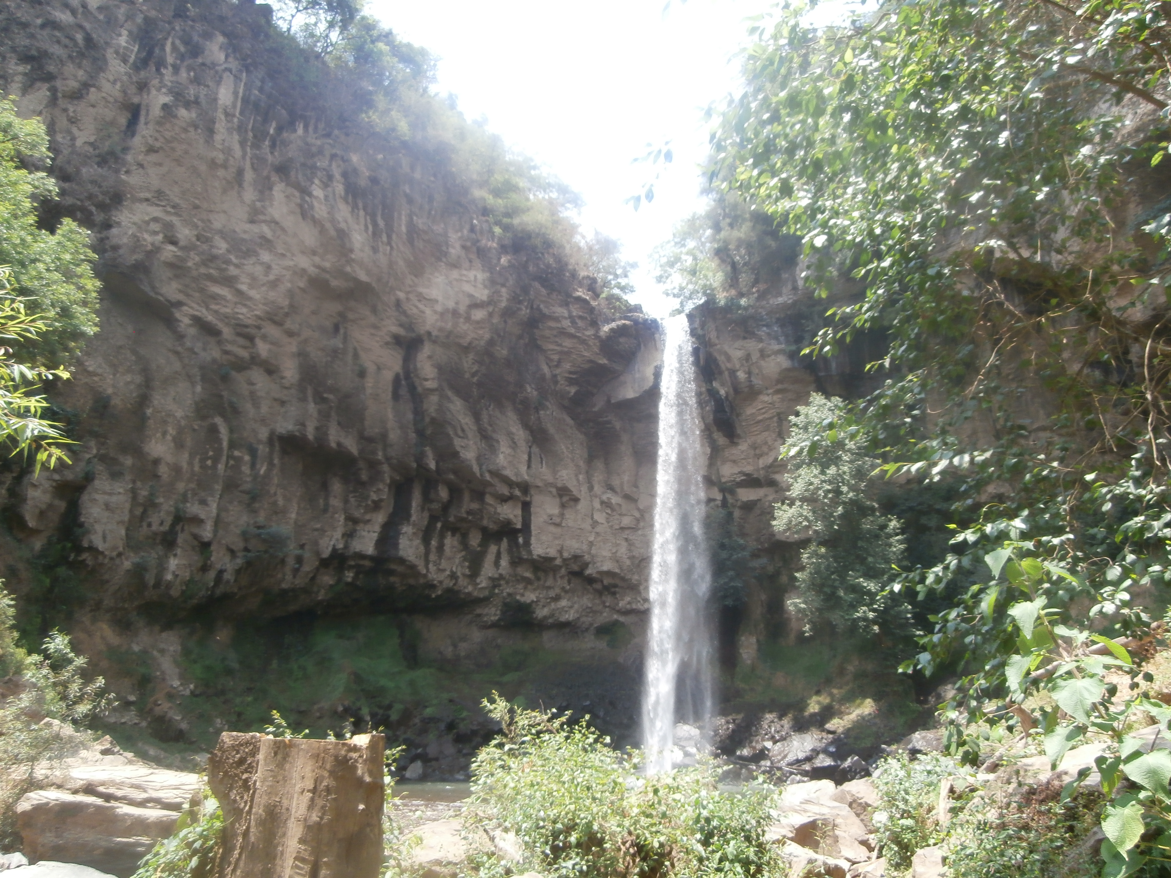 Salto "el Moro" en Tuxpan, Michoacán